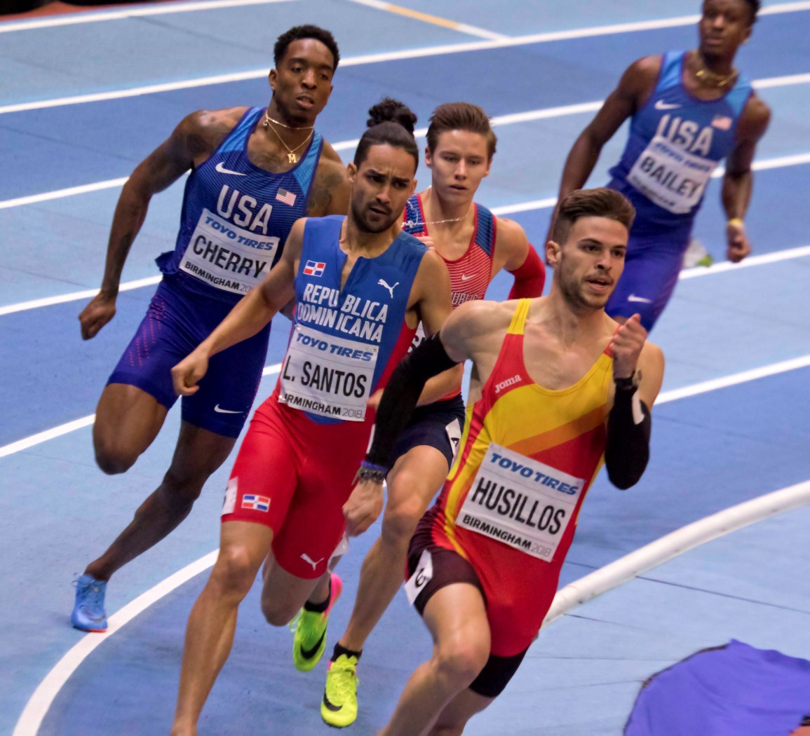 WK3B0262 400m finale heren maslak